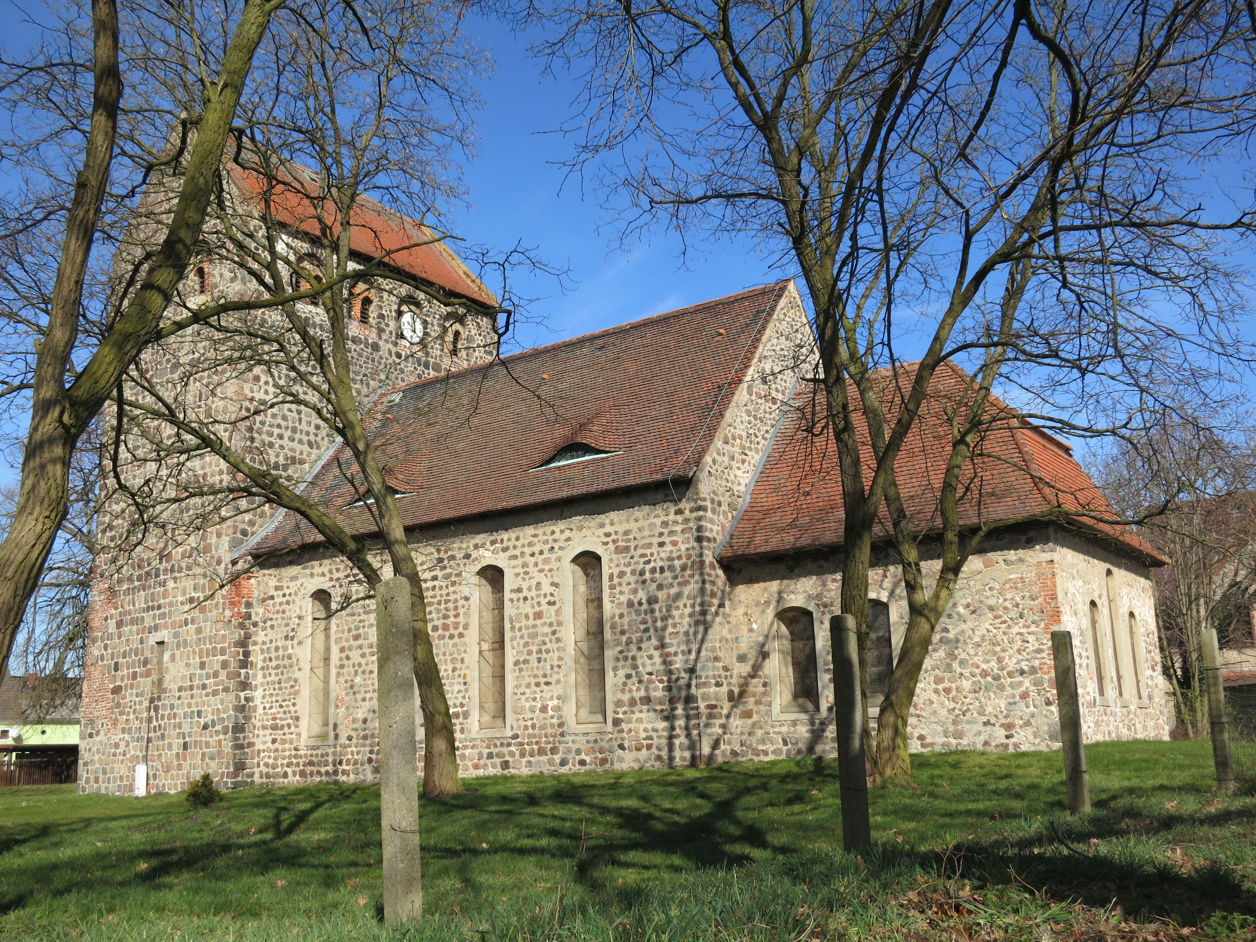 Romanische Kirche in Reetz, Gemeinde Wiesenburg/Mark, mit Mauer